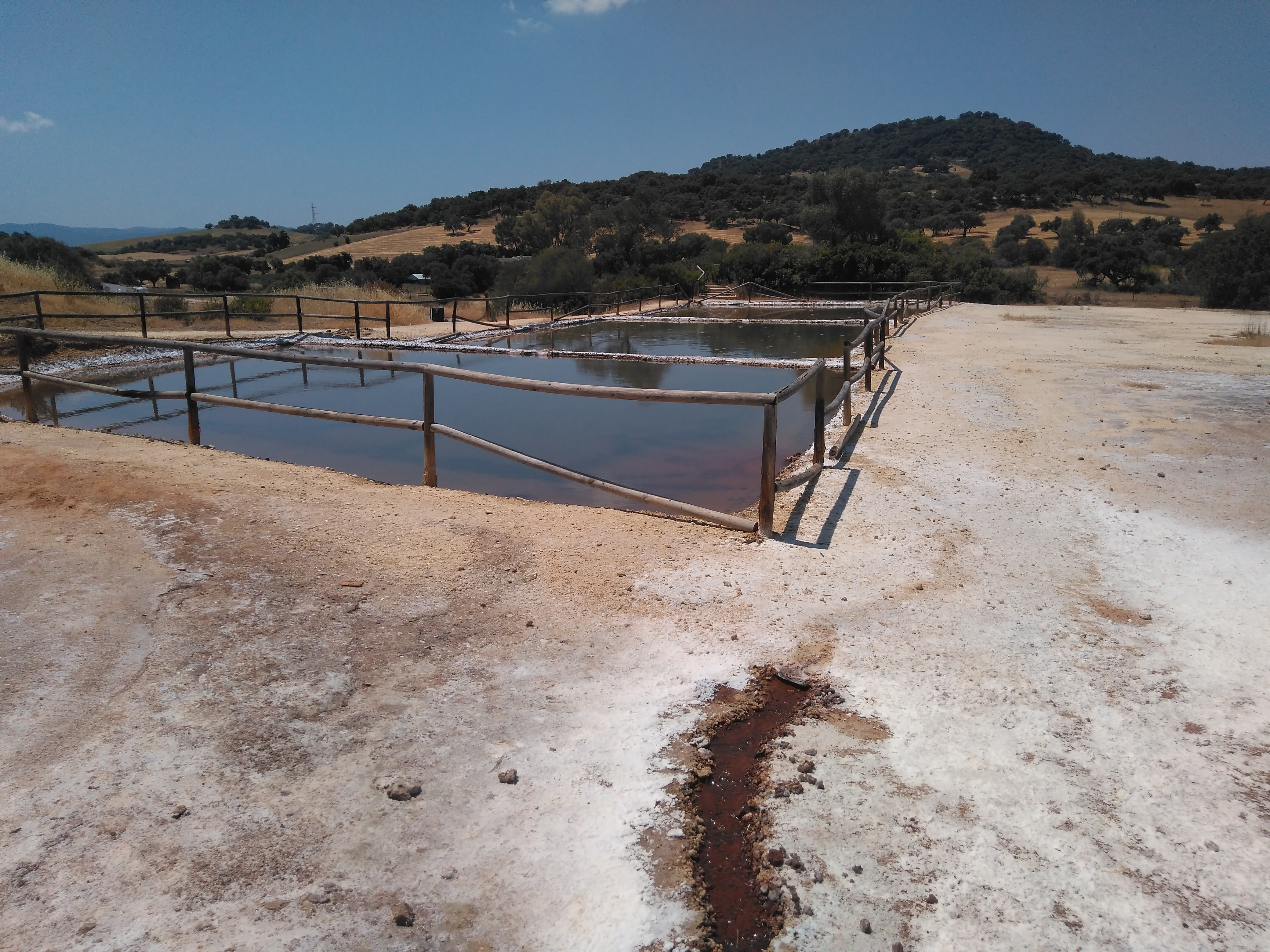 Salinas Iptuci (parque natural Sierra de Grazalema, España)